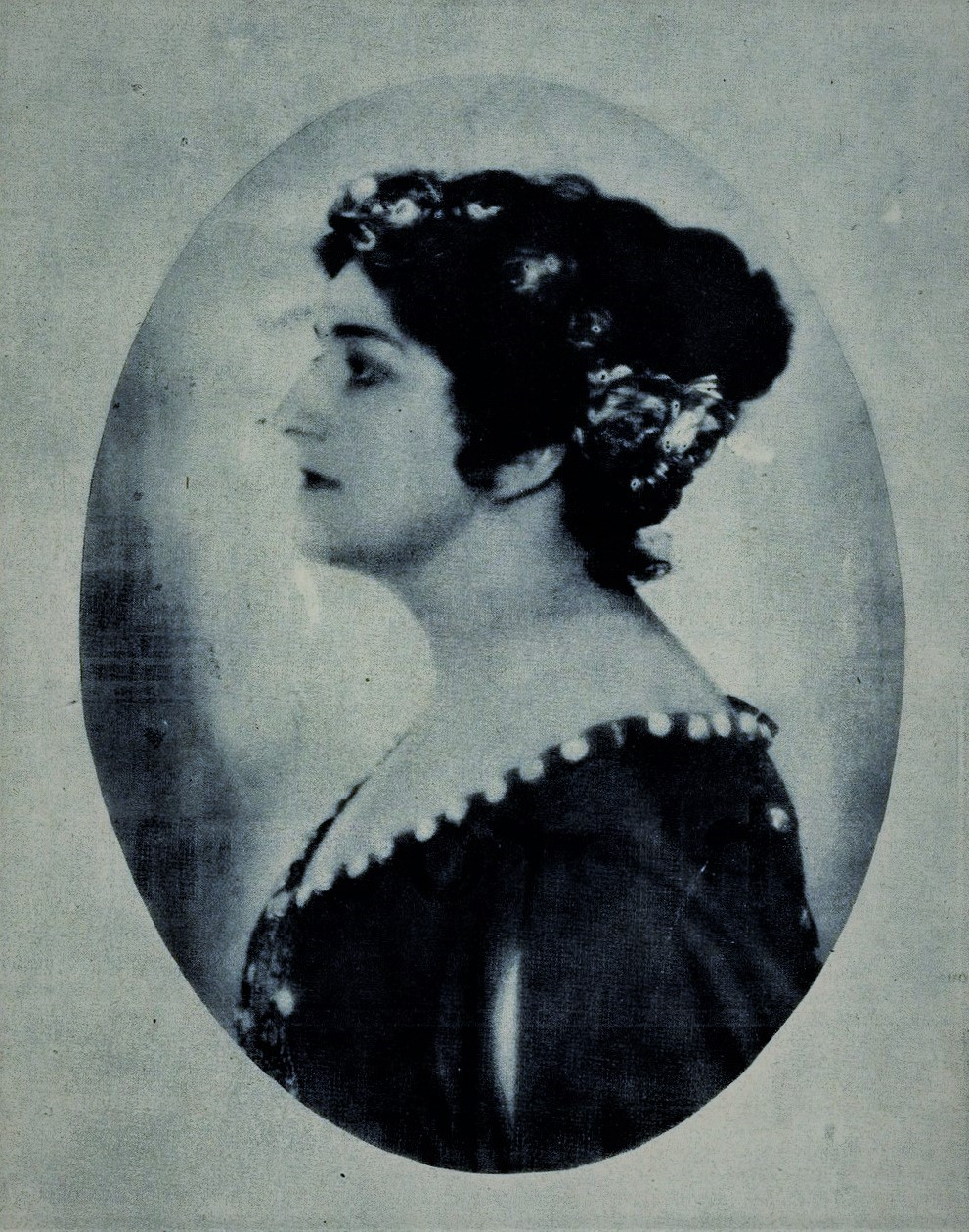 Berta Morena als Theophano in der gleichnamigen Oper von Paul Graener, 1918